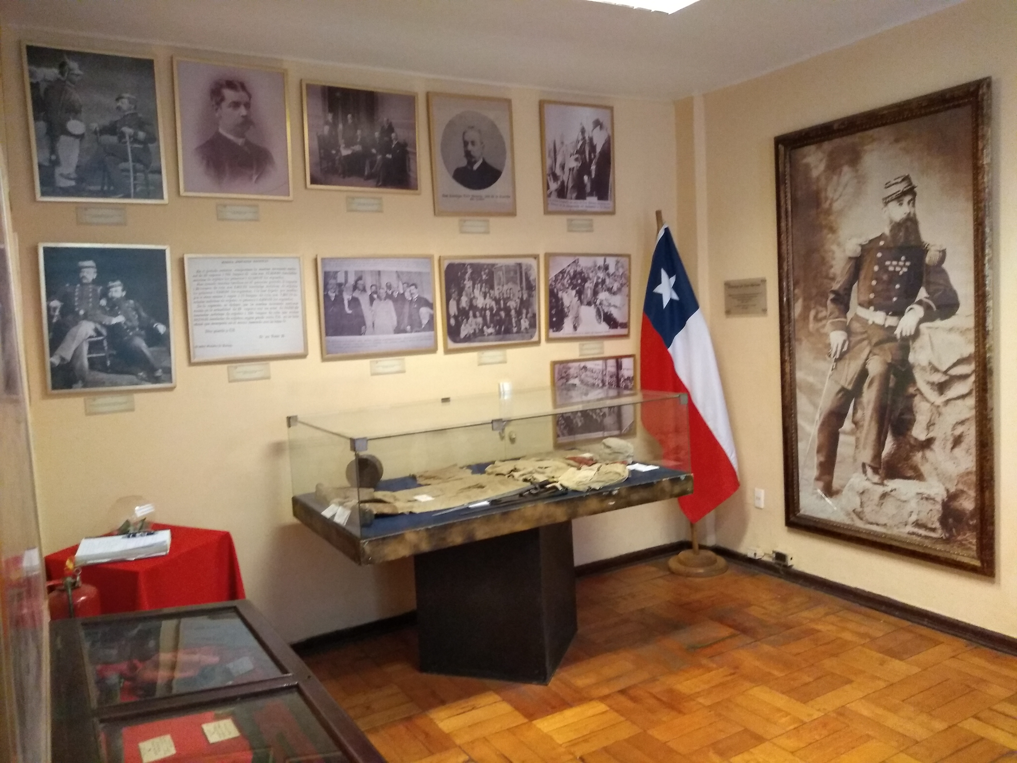 Salón Central Domingo de Toro Herrera